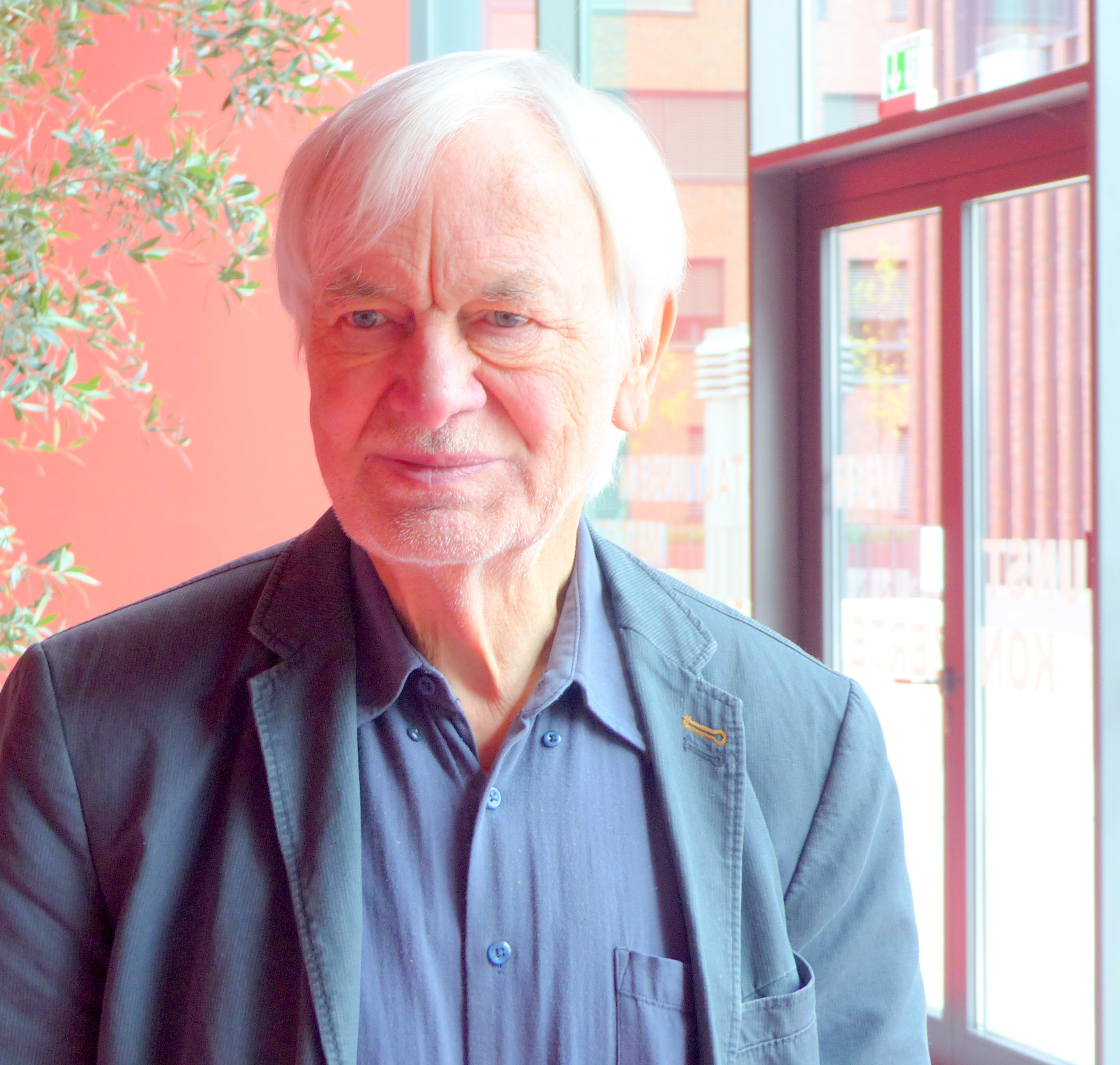 Joochen Laabs, Dortmund 2017